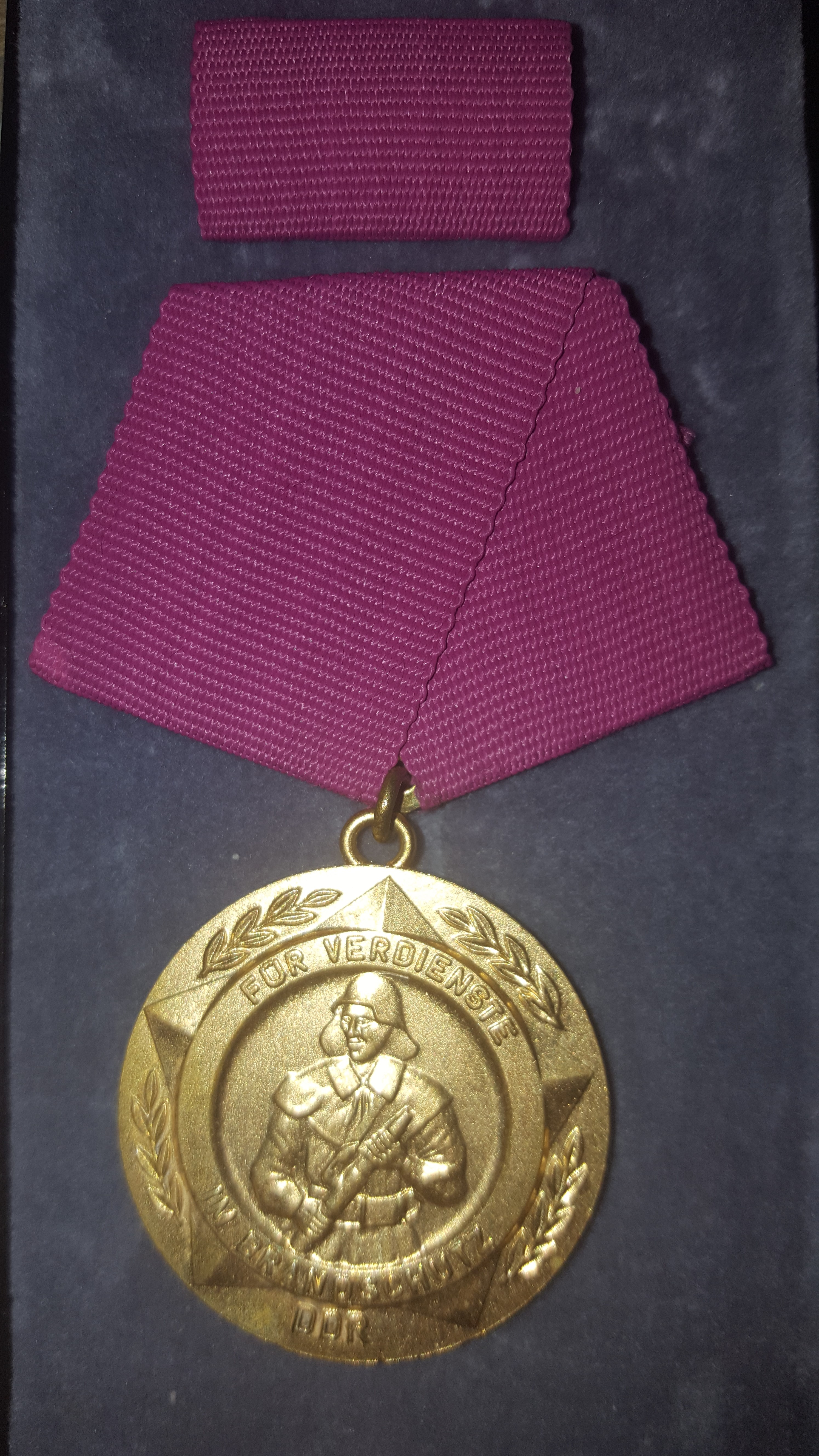 médaille